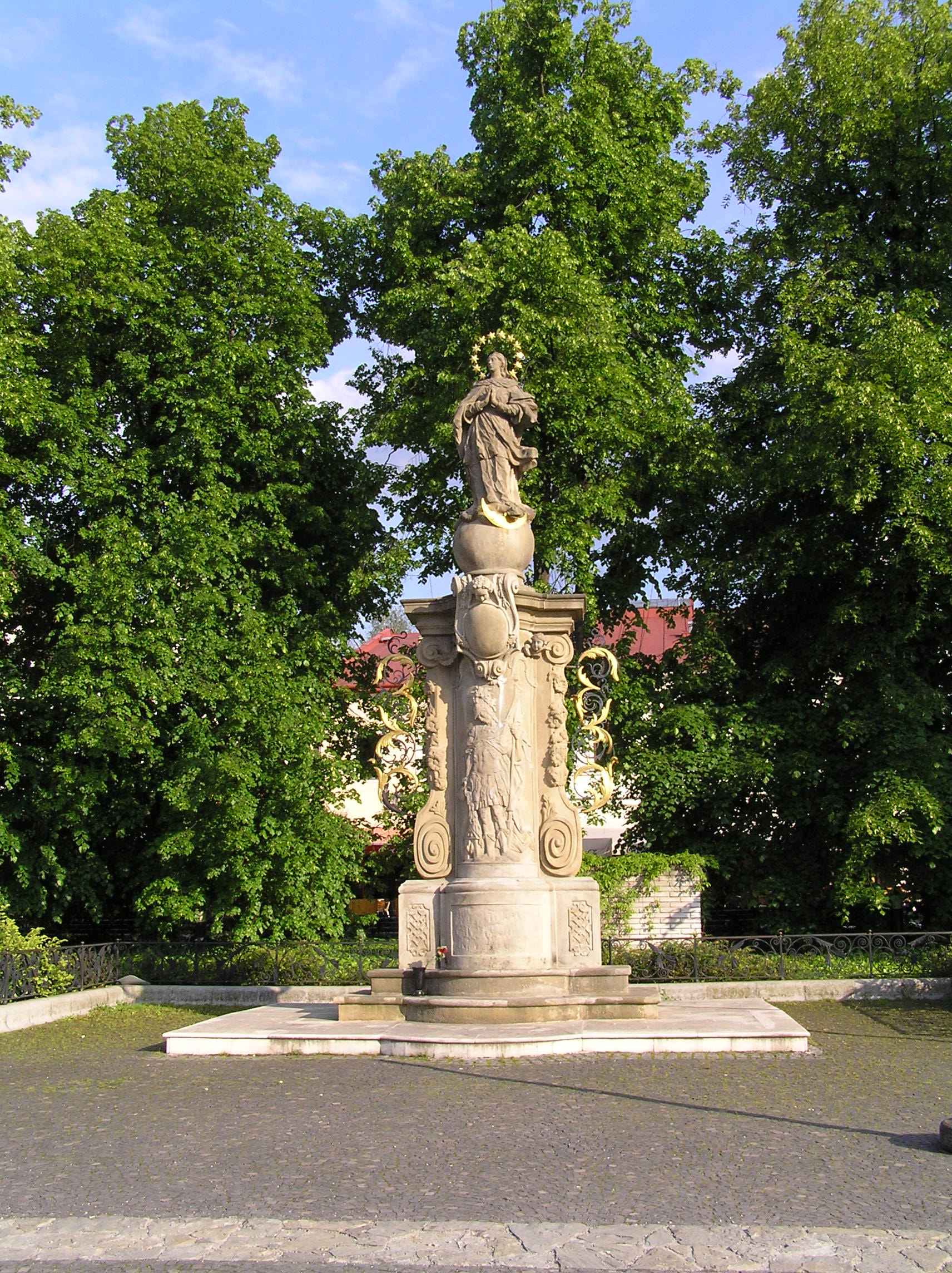 socha Nepoškvrnenej (Immaculata) Panny Márie Mariánske námestie, Žilina